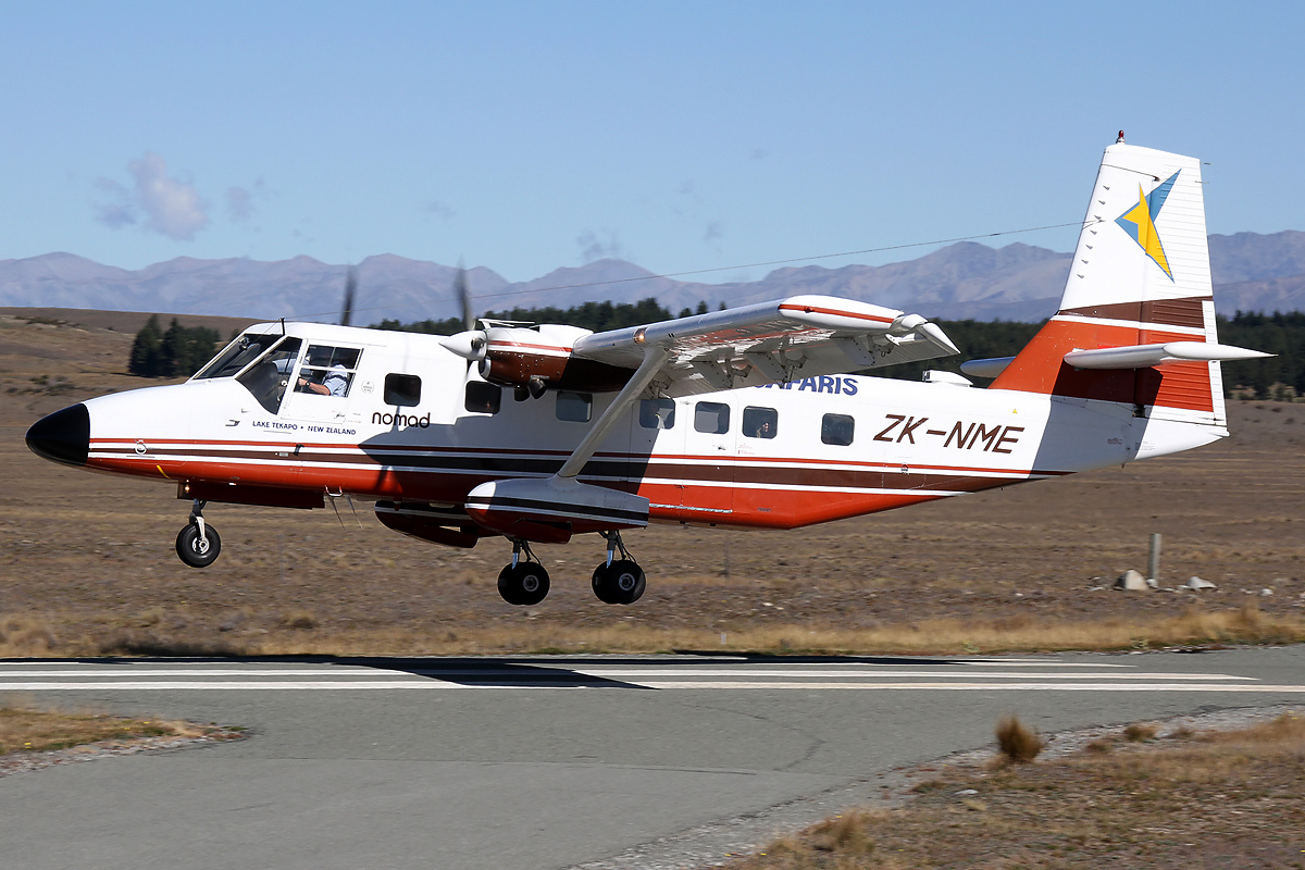 Port side view of Air Safaris GAF N24A Nomad ZK-NME Cn N24A-122 about to land on the runway at Lake Tekapo NZTL on 28Mar2016. This location is ideally placed for scenic flights over New Zealand’s mountainous South Island topography. ‘Aotearoa’ (Land of the Long White Cloud) comes readily to mind. Thanks to our Tour Leader for stopping at Lake Tekapo Airport during our coach trip from Wanaka to Christchurch Camera: Canon EOS 7D Sigma 18-250mm f3.5-6.3 DC OS HSM